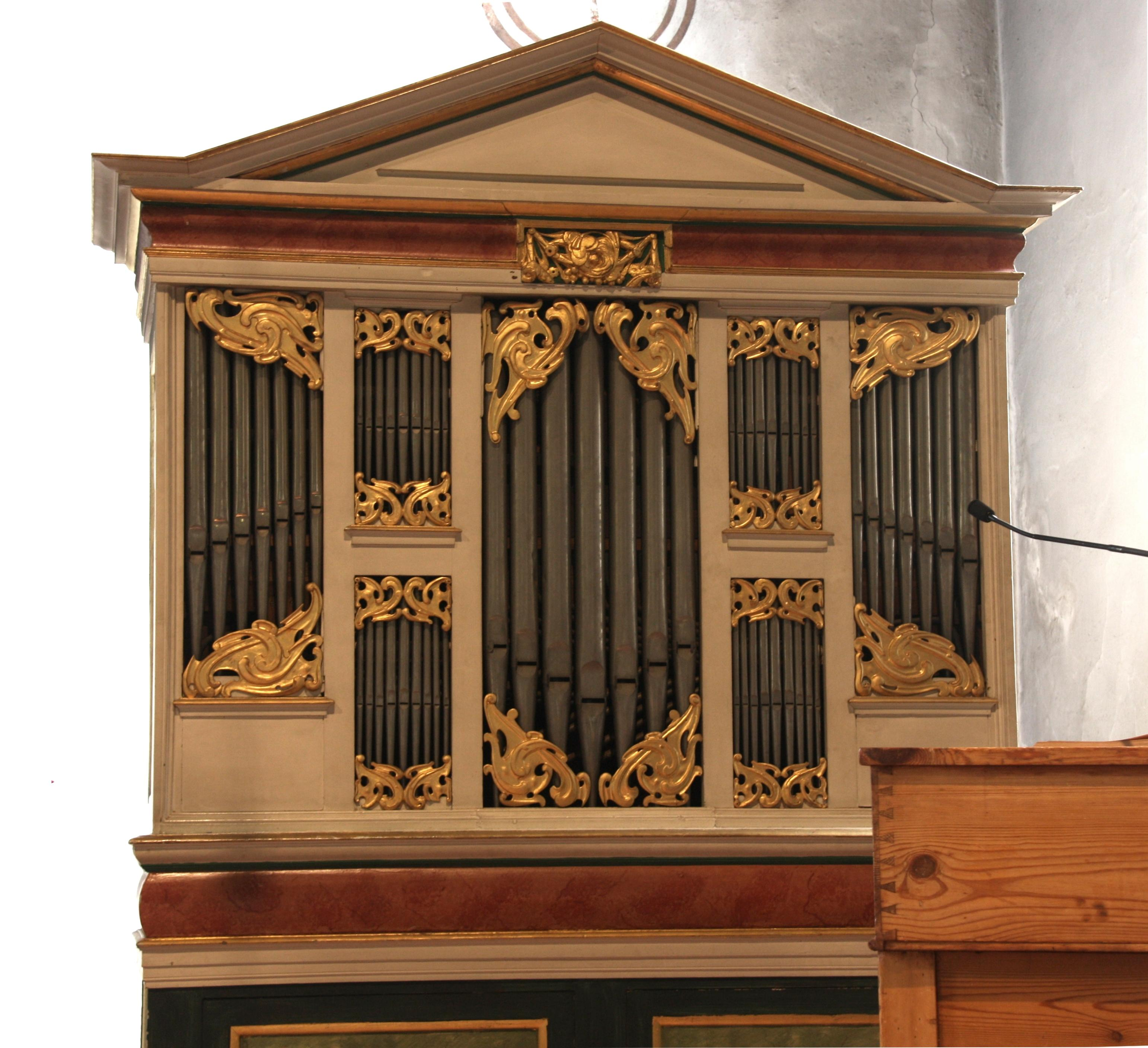 Hamburg, Bergstedter Kirche, Kleine Orgel, Arp Schnitger 1686